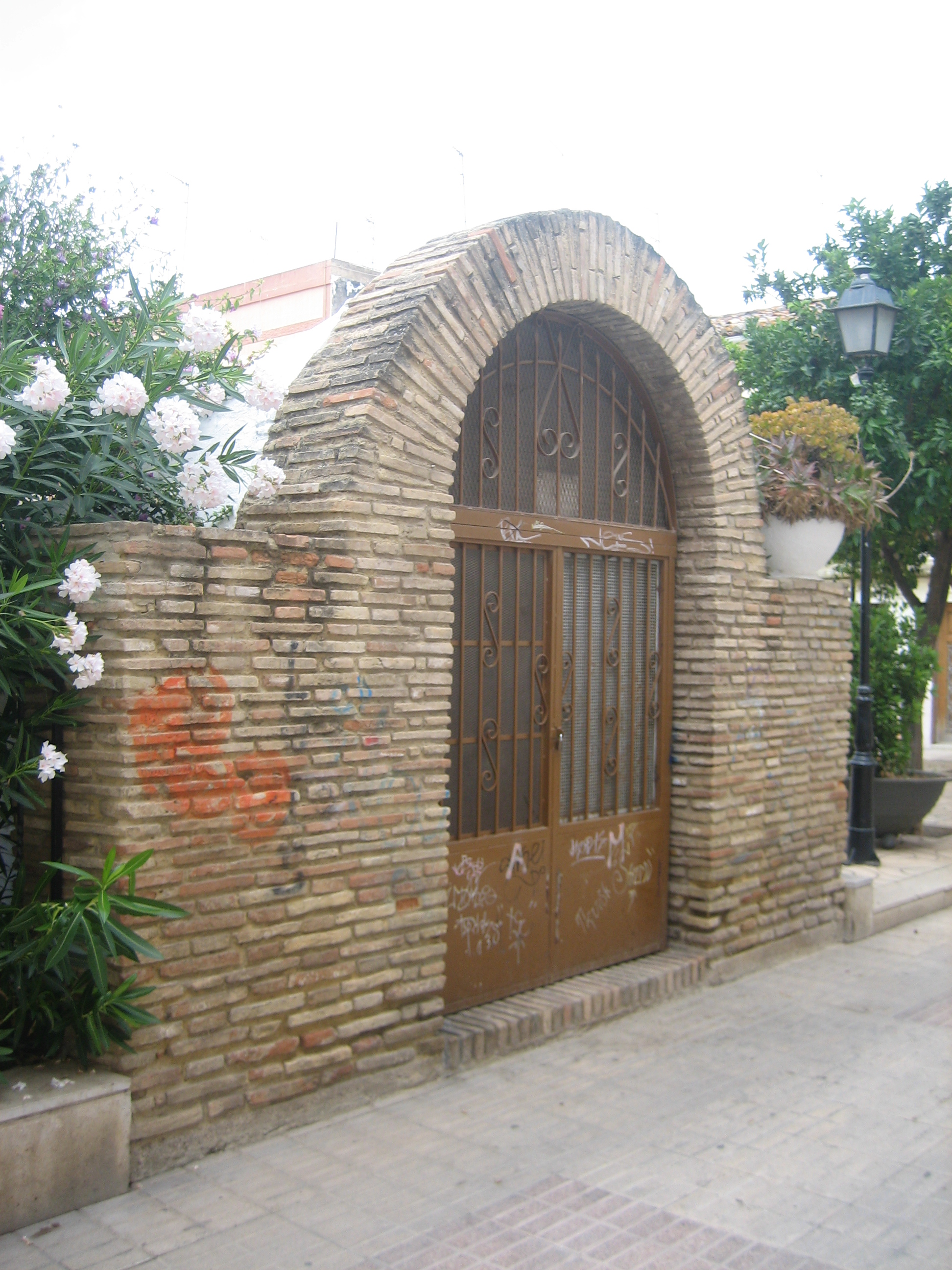 Porta de l'entrada de la cisterna àrab de Quart de Poblet, a la província de València